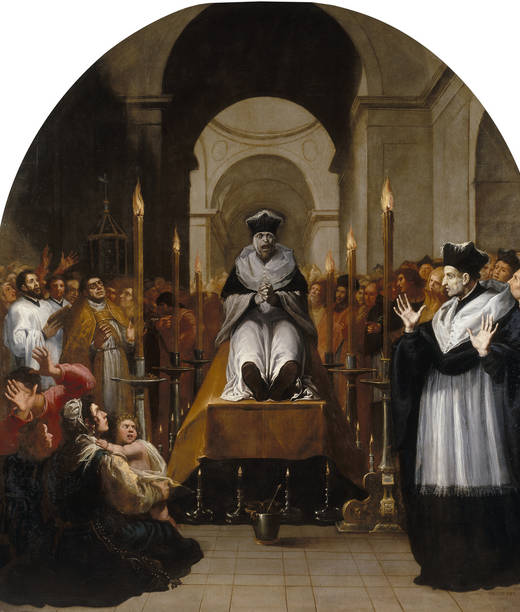 La conversión de San Bruno ante el cadáver de Diocrès.label QS:Les,"La conversión de San Bruno ante el cadáver de Diocrès."